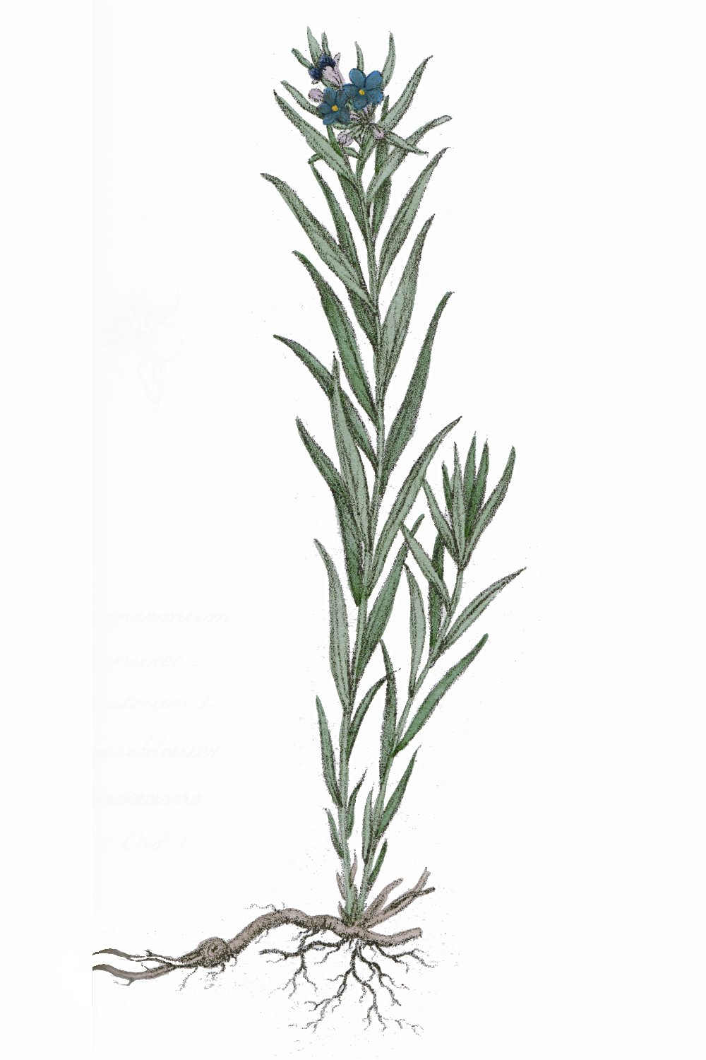 Dictionaire des plantes suisses 1853 Scanné par Utilisateur:Greatpatton